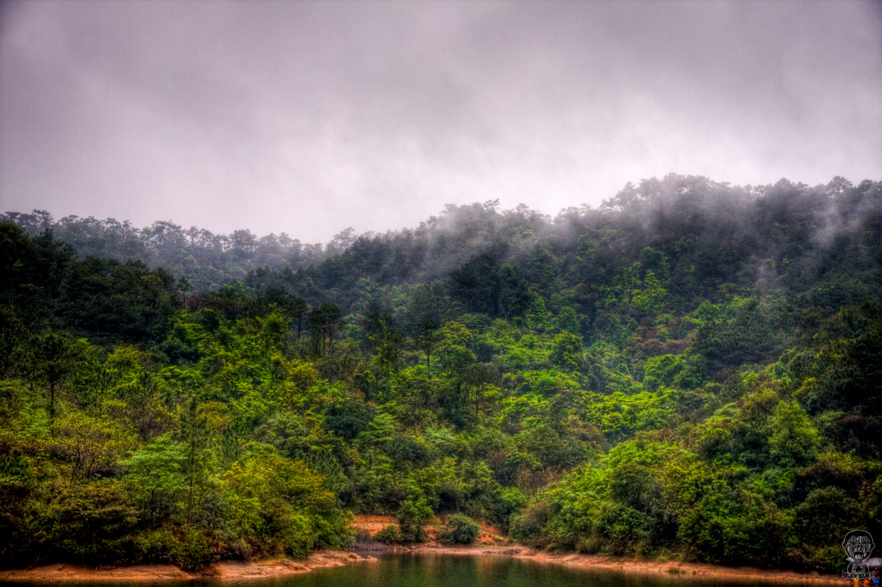 芙蓉嶂 桃花水母发现地